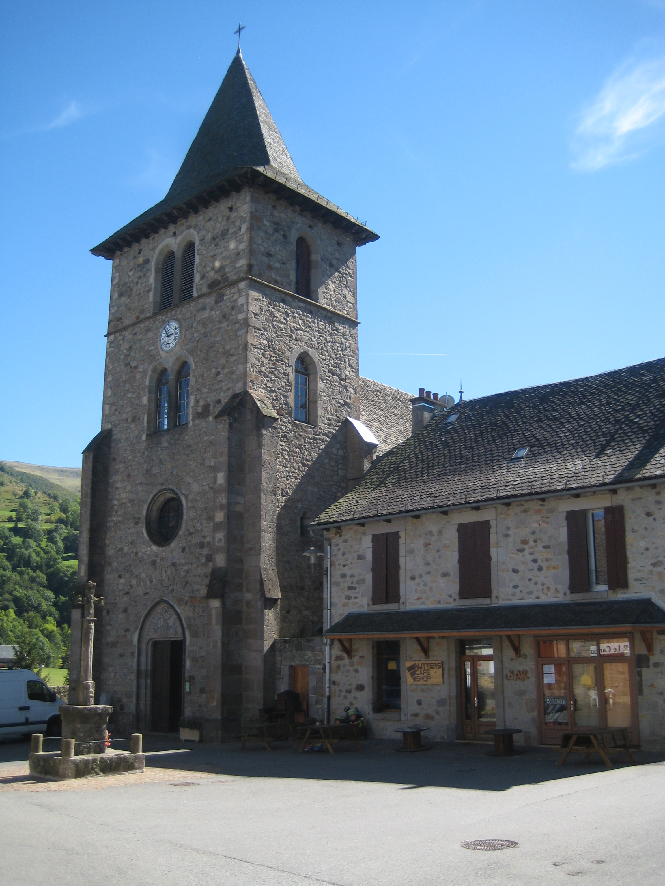 église de Saint-Jacques-des-Blats